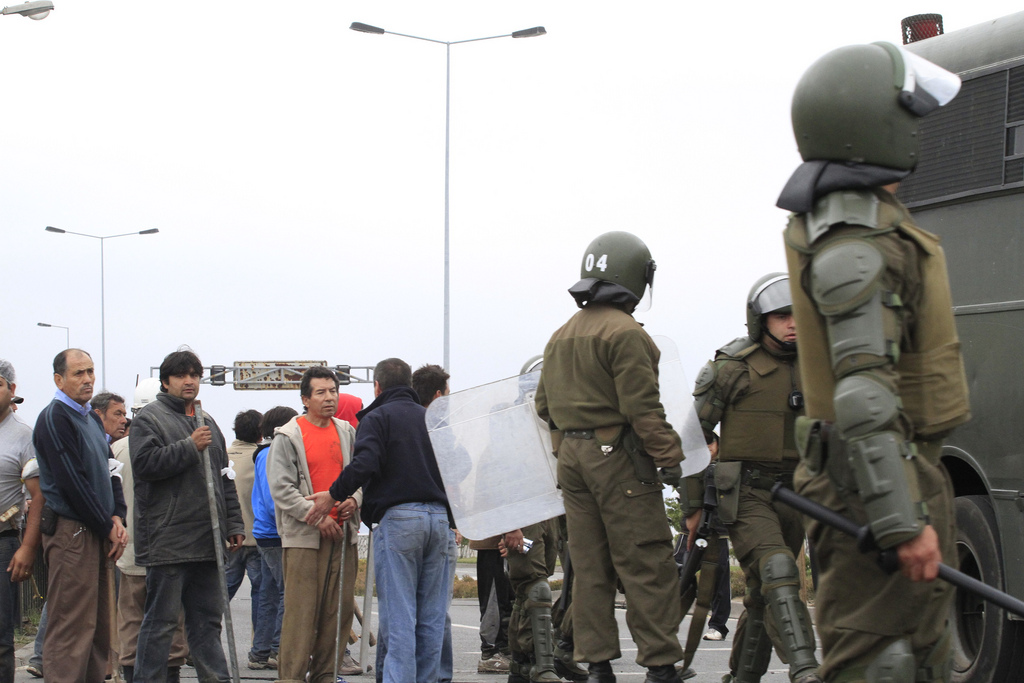 Carabineros junto a personas protegiendo sus bienes en Concepción, tras el terremoto del 27 de febrero de 2010.